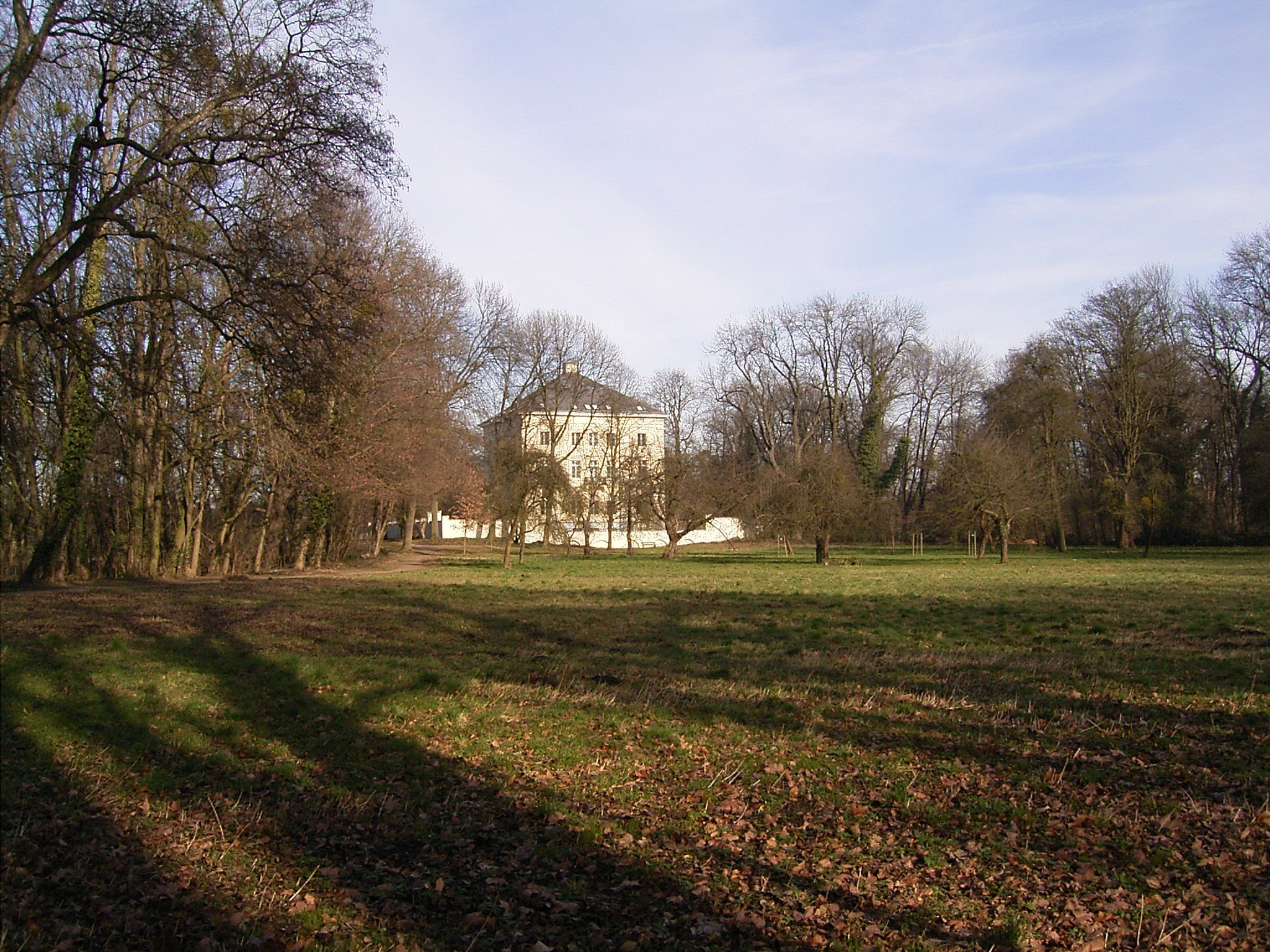 Schloss Mickeln in Düsseldorf